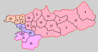 和歌山県有田郡の町村制時点の町村。